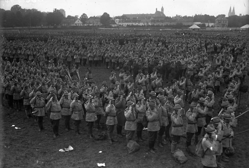 Mitglieder der Heimwehren in der Wiener Neustadt. Information added by Wikimedia users.Wiener Neustadt, Sammlung der Formationen der Heimwehren auf der Neuklosterwiese, Aufmarsch der Heimwehr und des Schutzbundes in Wiener Neustadt